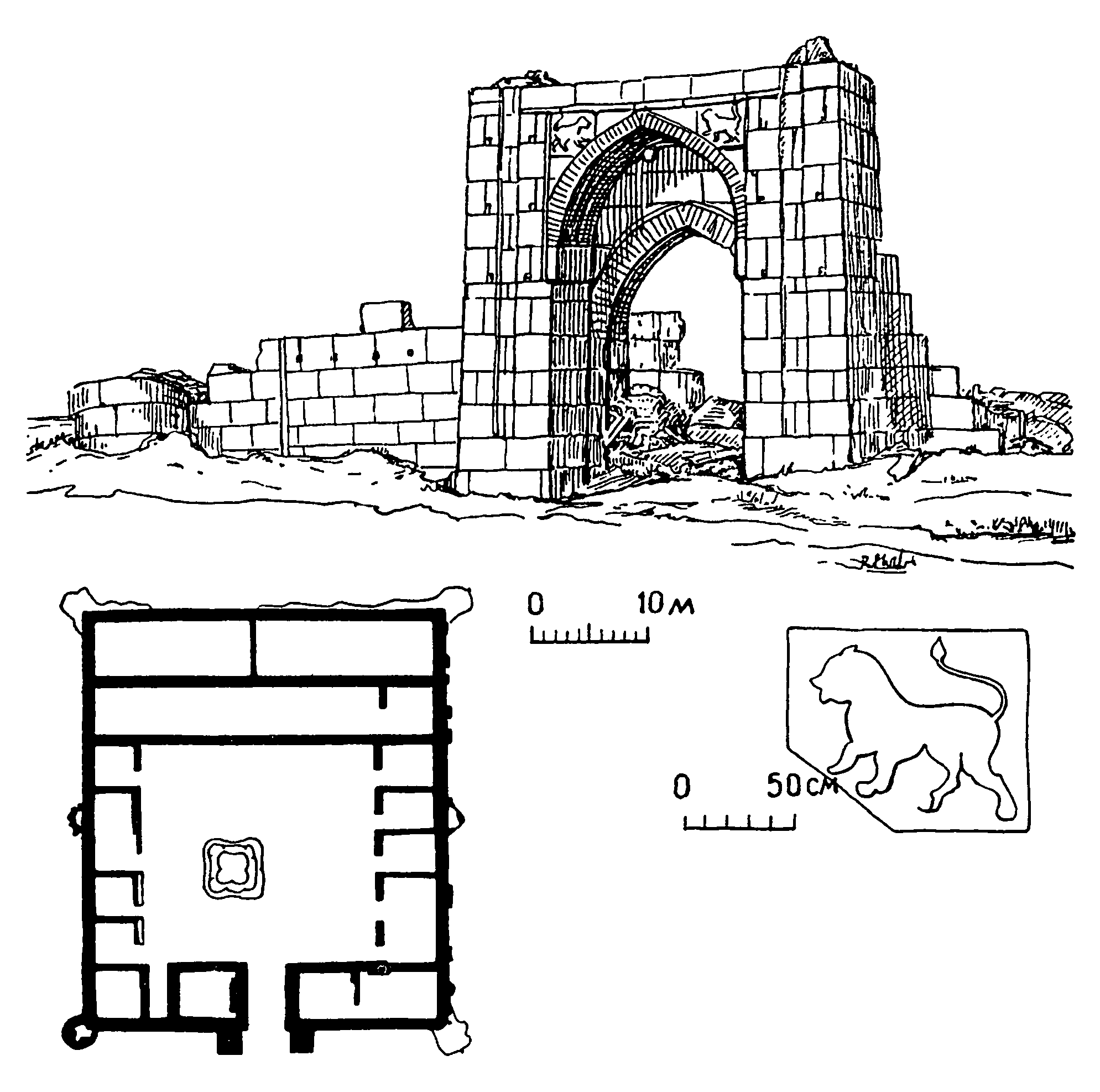 Архитектурный комплекст XIV века Белеули план